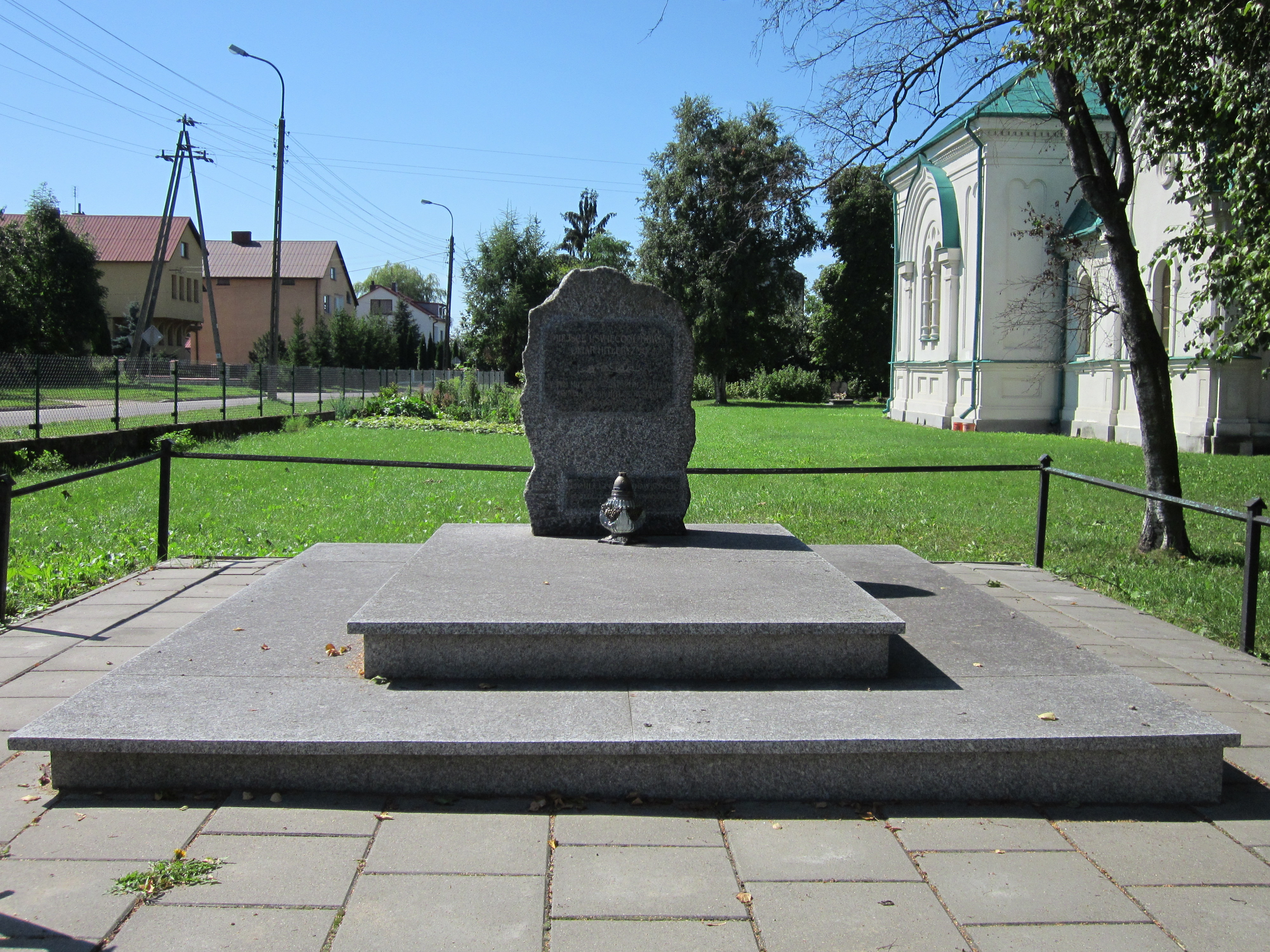 ul. Mickiewicza. W czasie II wojny światowej w cerkwi pw. Wniebowstąpienia Pańskiego oraz pod jej ścianami odbywały się egzekucji ludności cywilnej zginęło ponad 60 osób, upamiętnia to obelisk ustawiony na placu przy cerkiewnym następującej treści: ,,Miejsce uświęcone krwią ofiar hitleryzmu. W tym miejscu w latach 1941 –1944 zginęło z rąk hitlerowskich około 70 osób. Pamięci pomordowanych społeczność Ciechanowca”. Obecnie w planach jest ogrodzenie tego terenu.